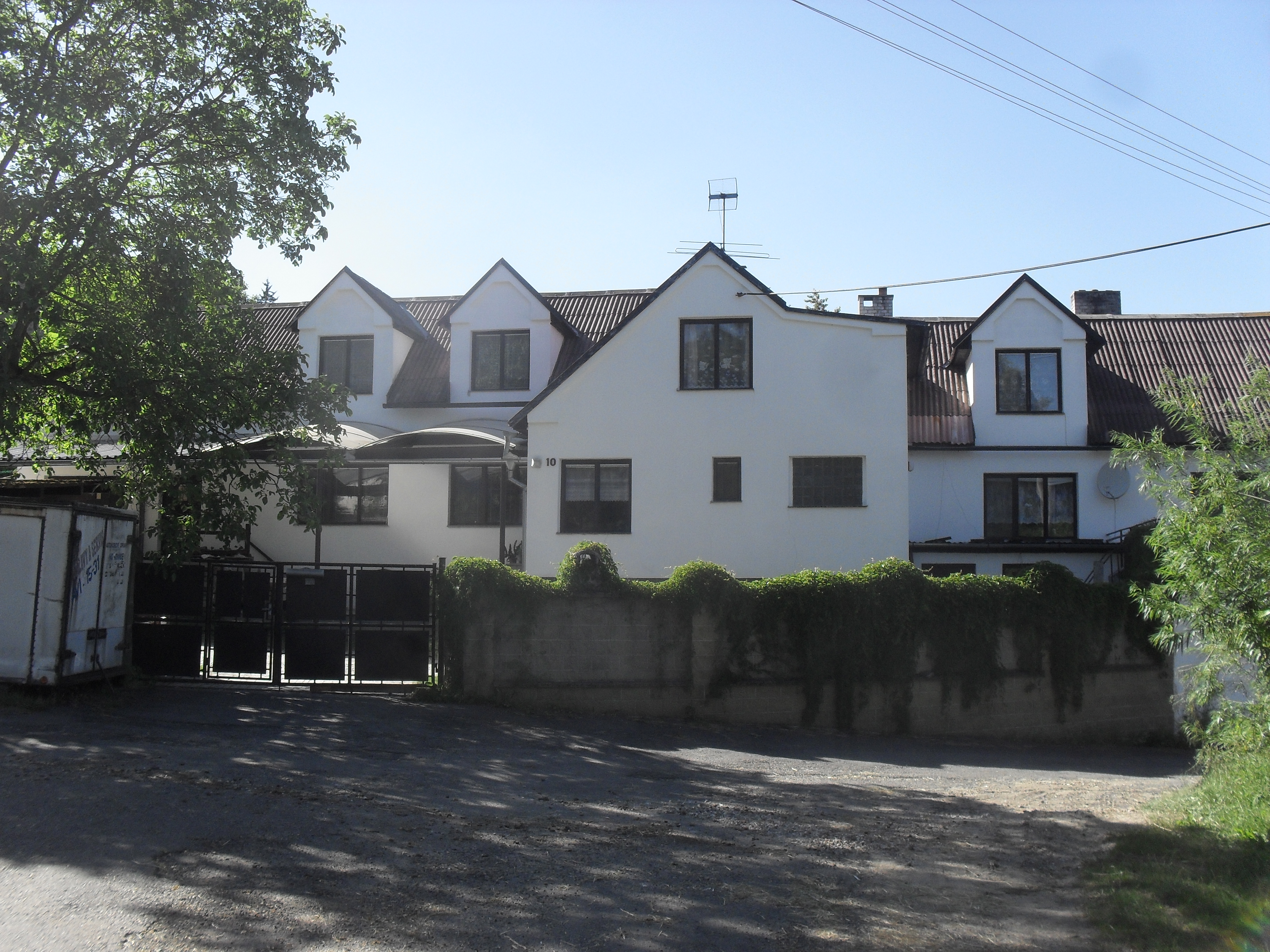 Fotografie pořízena v Týřovicích u Pačejova.